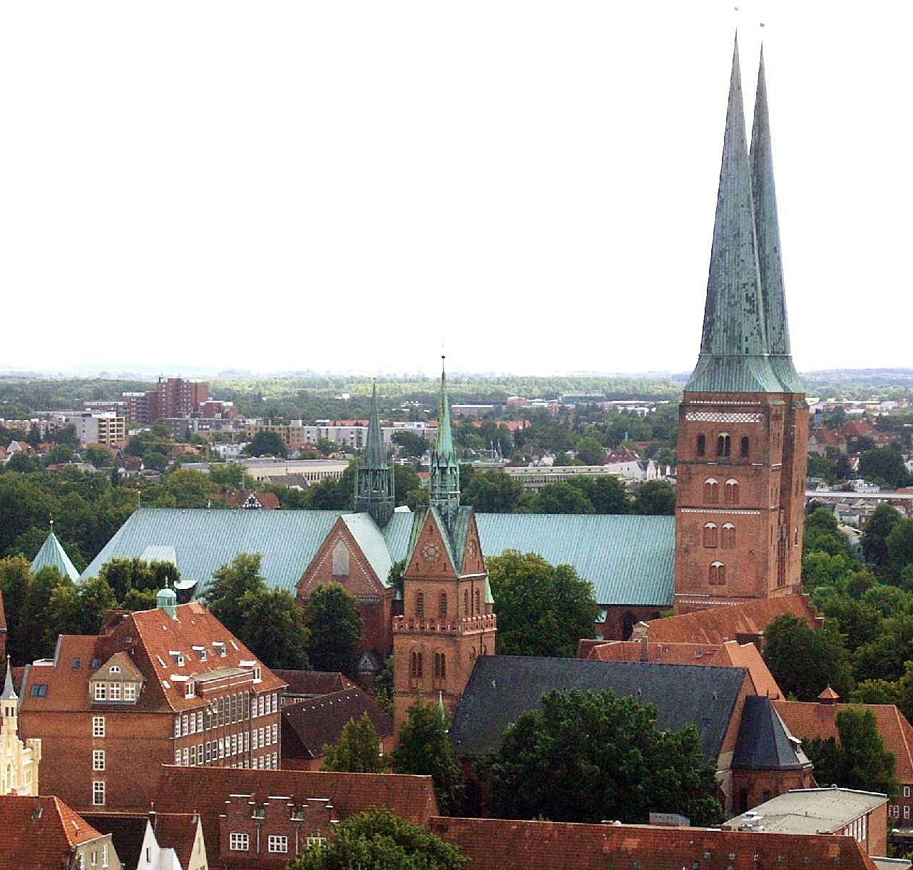 Lübeck, kath. Propsteikirche Herz Jesu vor dem ev.-luth. Dom